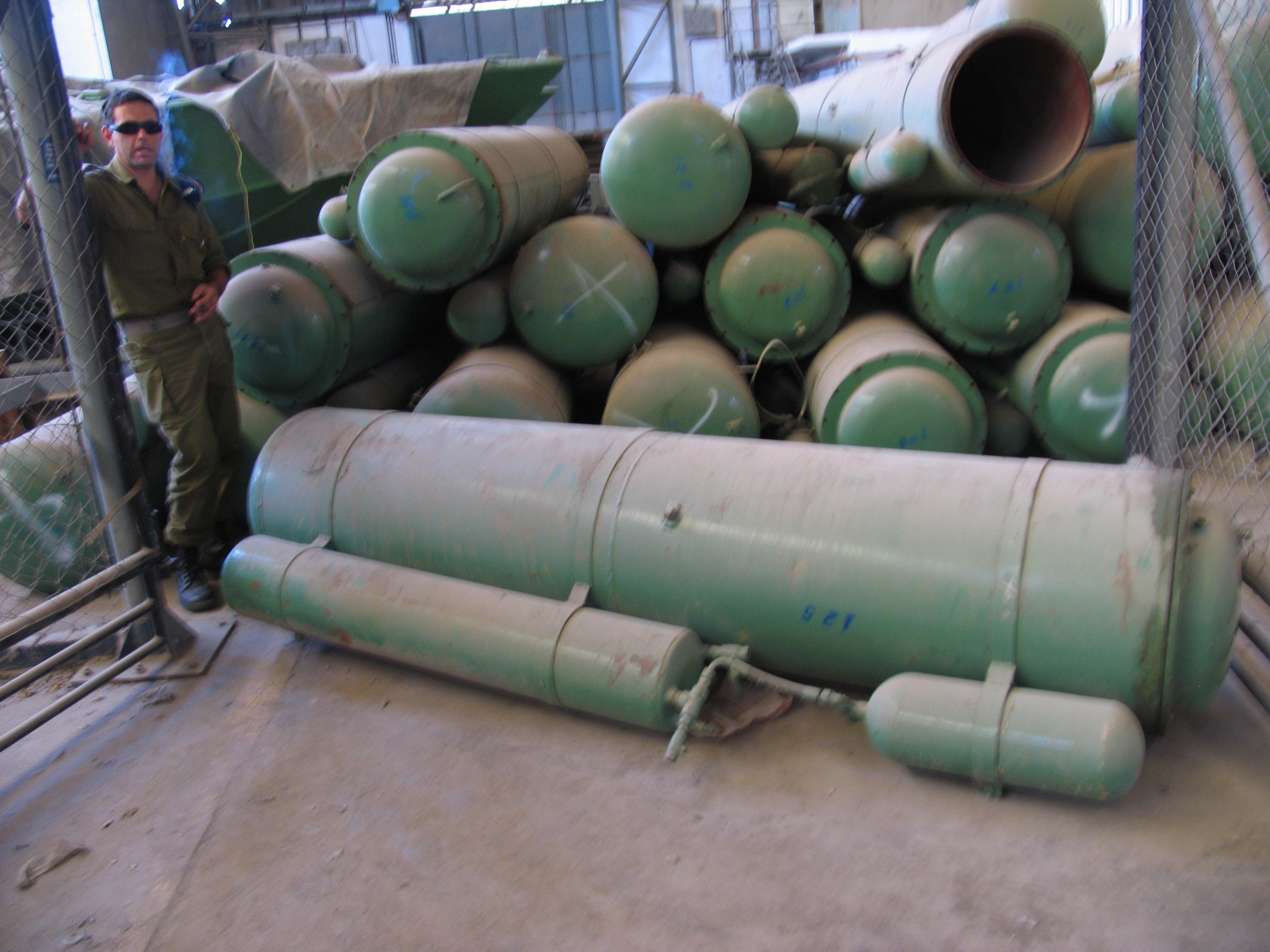 מיכלים אטומים להעברת חימוש שנתפסו על האונייה 'קארין אייבמחסן בבסיס אילת